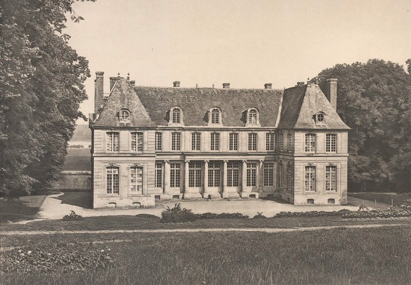 Nordseite des Schlosses Yville in der Normandie